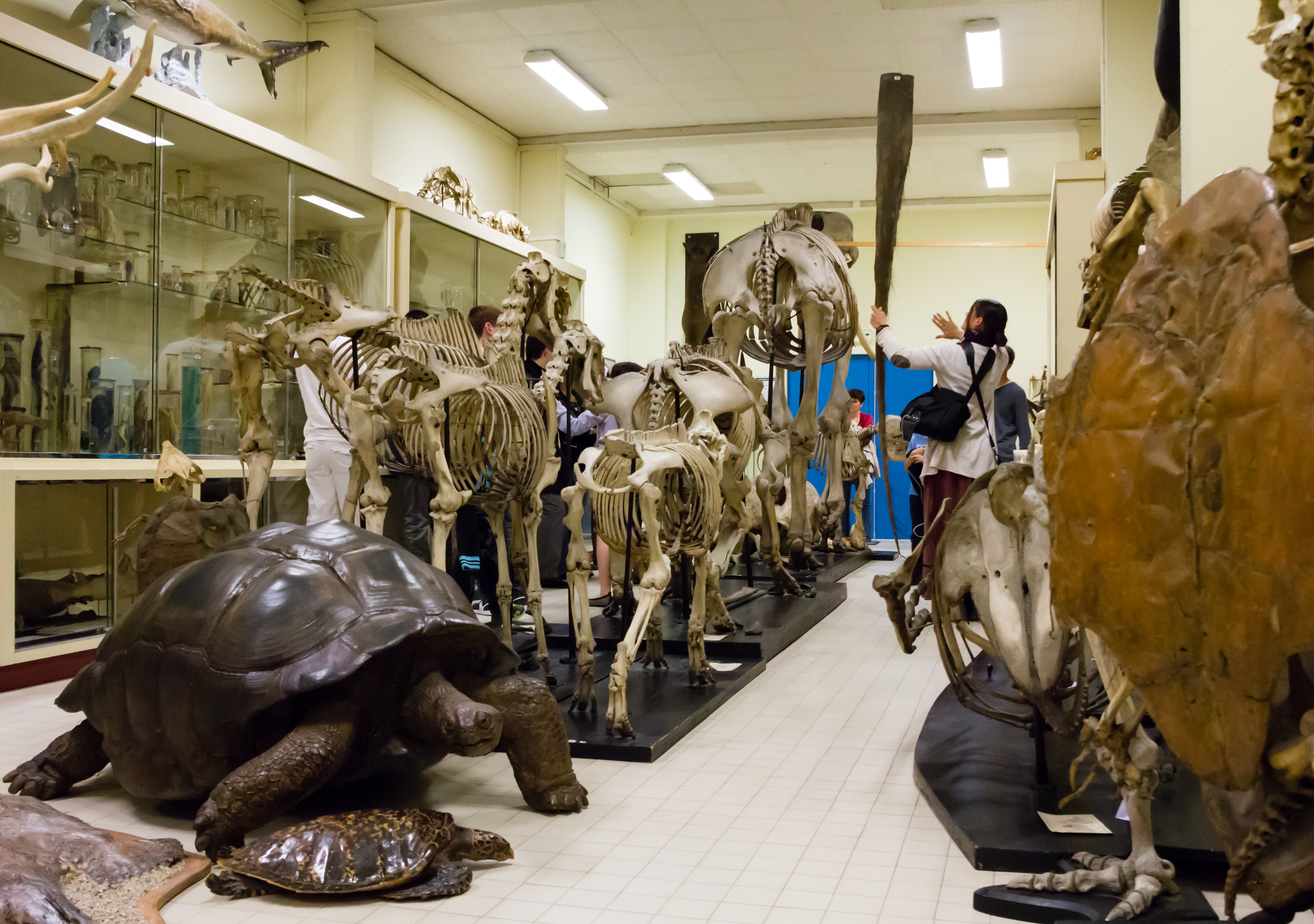 Visite de la gallerie de zoologie de l'Université de Rennes 1 lors de la Nuit européenne des musées en 2014.